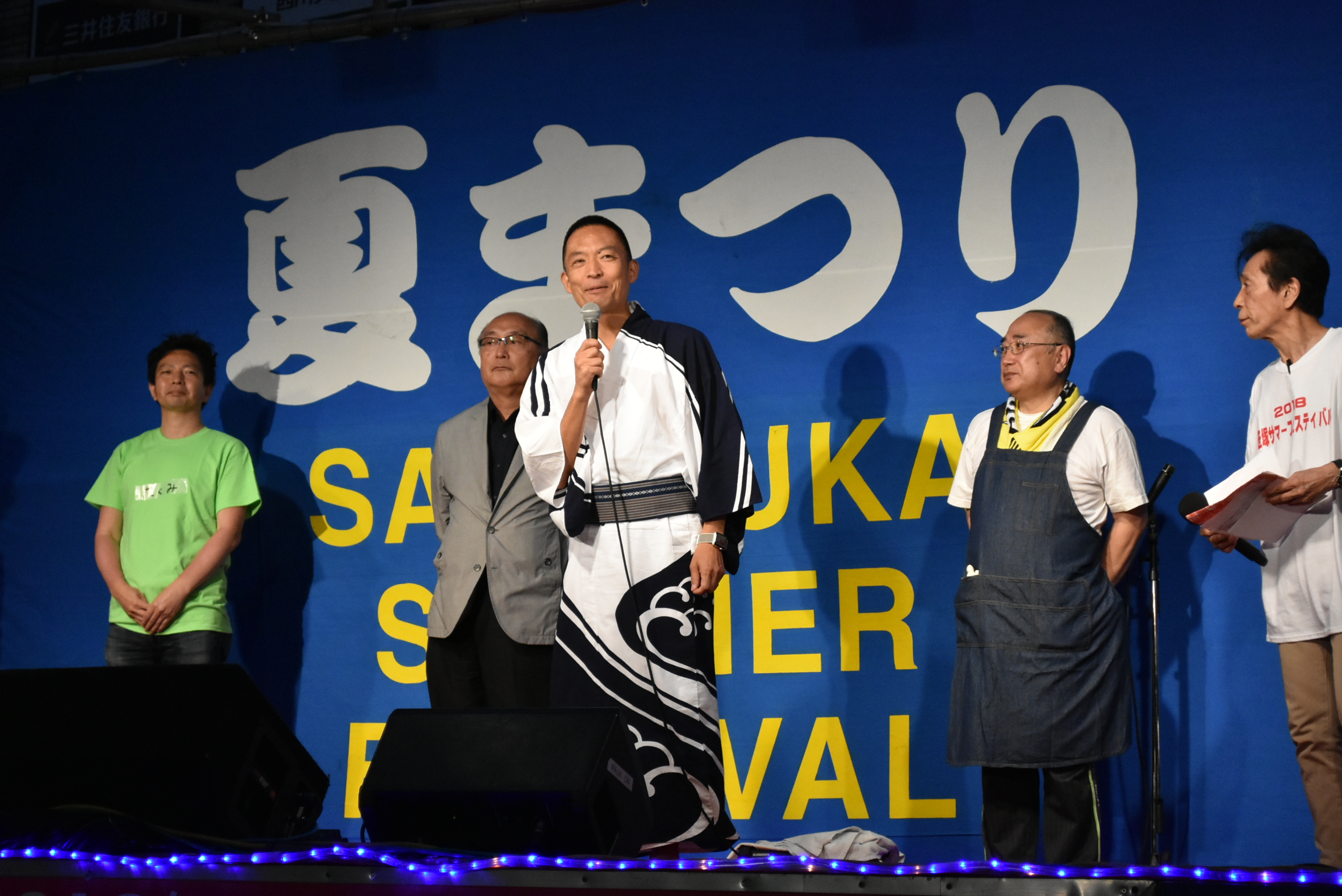 長谷部 健